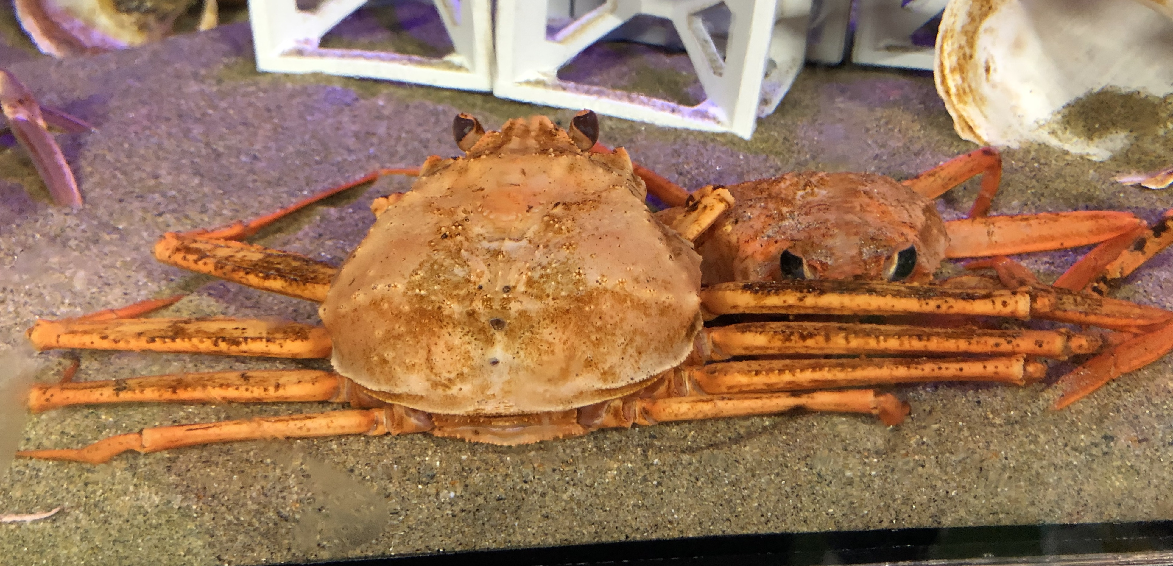 かにっこ館飼育のベニズワイガニ